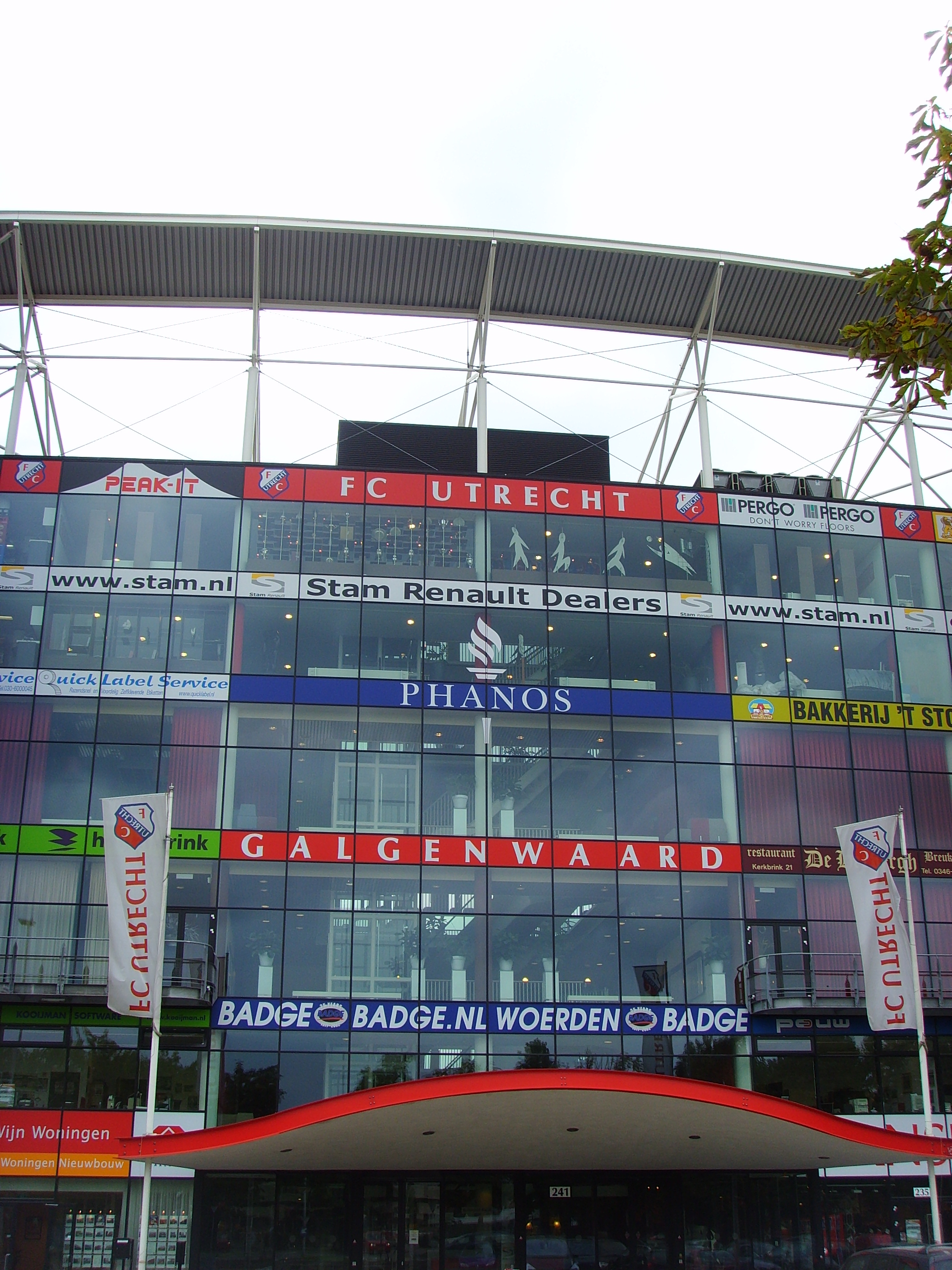 Stadion